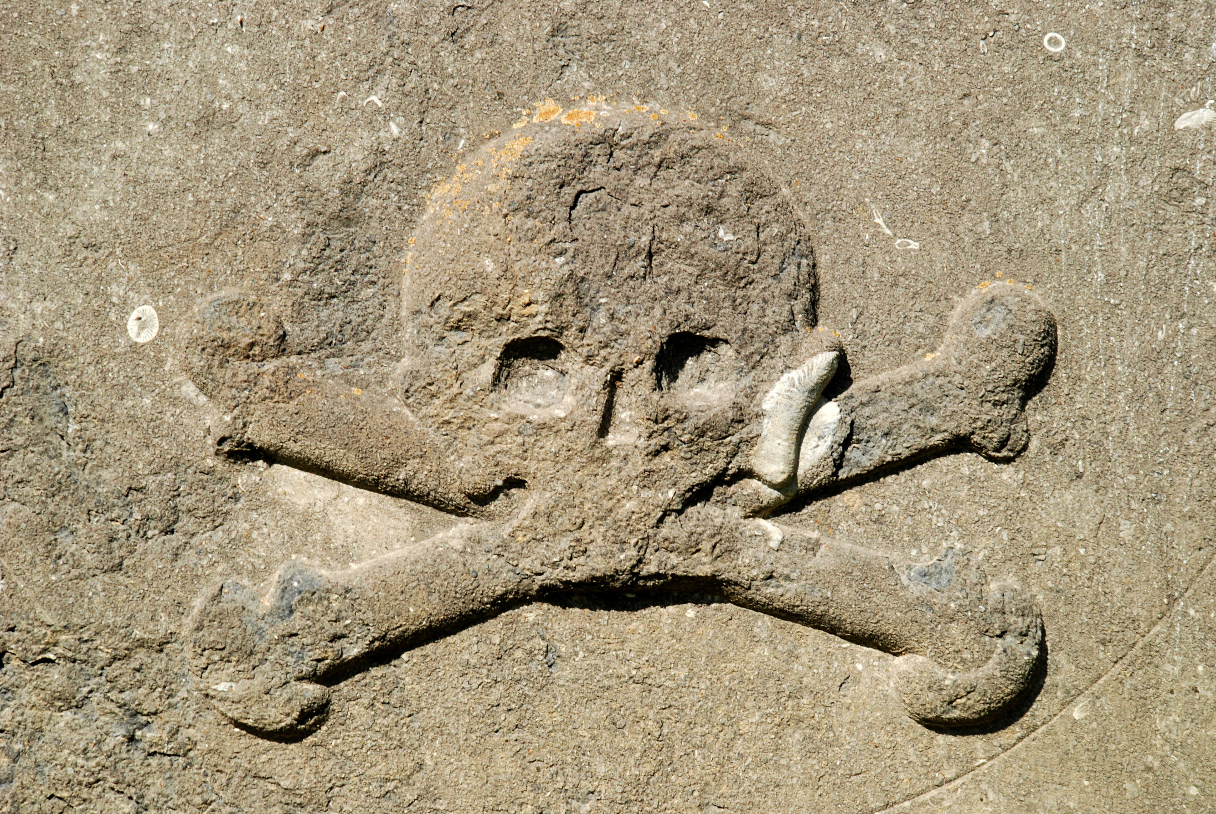 Belgique - Brabant wallon - Court-Saint-Étienne - Ancien cimetière paroissial